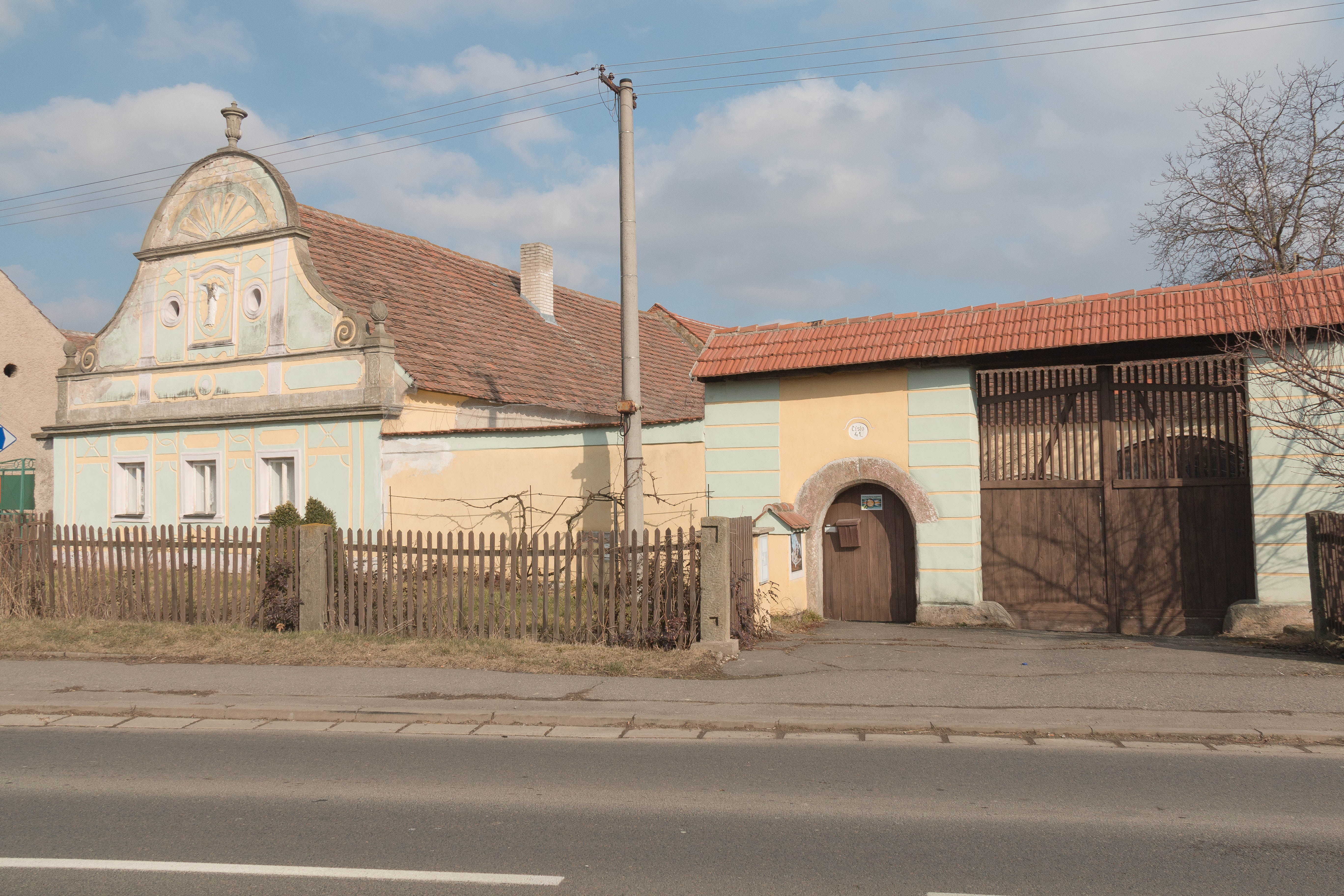 Orel u Slatiňan čp. 41